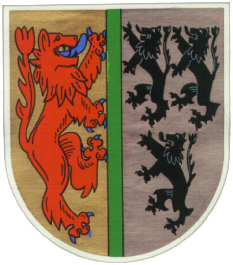 Wappen von Gösenroth